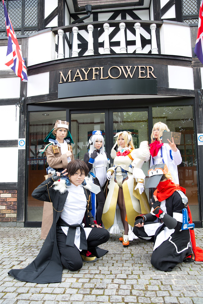 Cosplay de personajes de Kyōkai Senjō no Horizon.